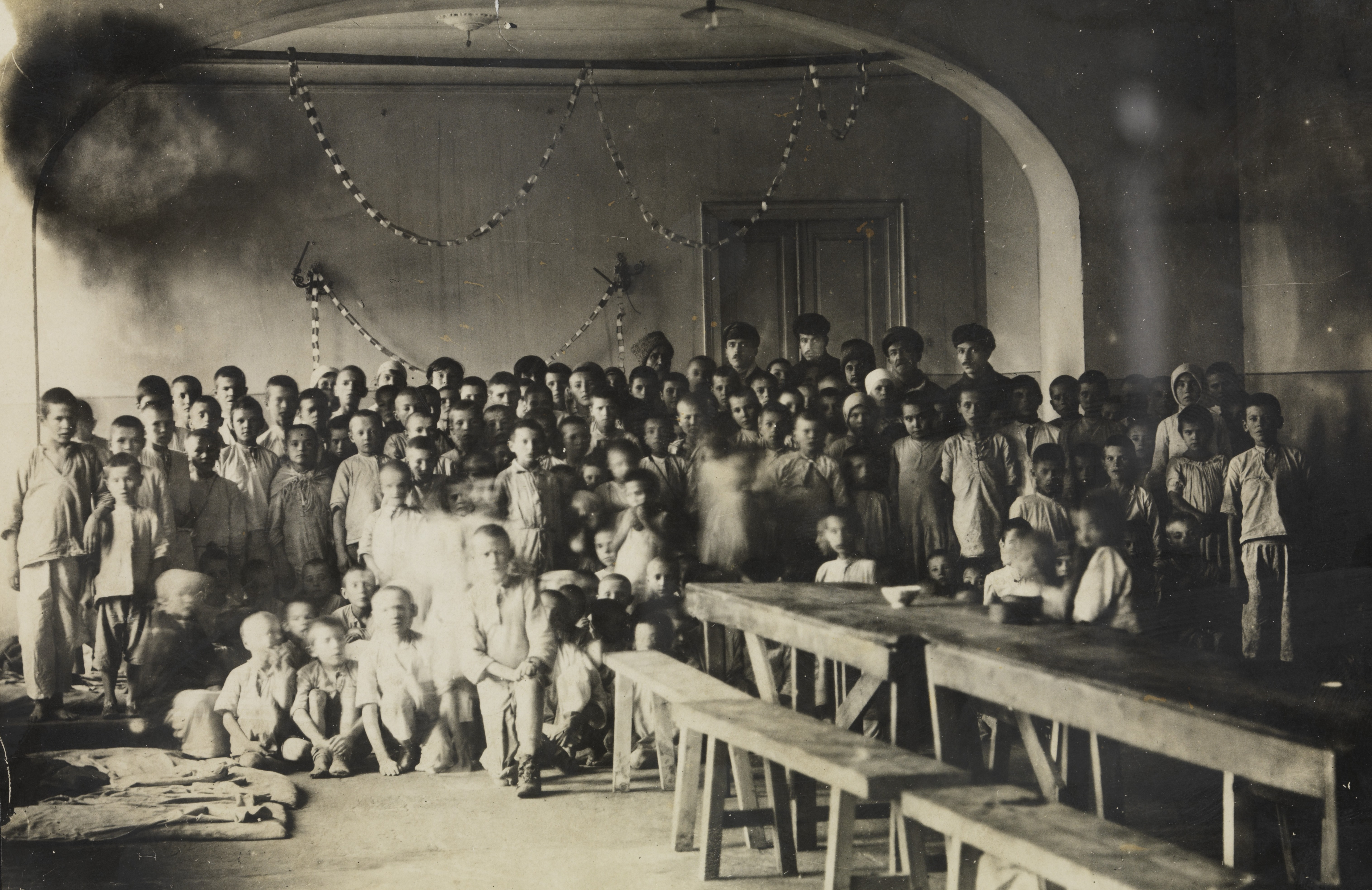 Foreldreløse barn i et barnehjem. I Samara, Kasan og Orenburg, med tilsammen 9 millioner mennesker, var en femtedel flyktet. En stor del av disse omkom. Depicted place: Russland, Orenburg